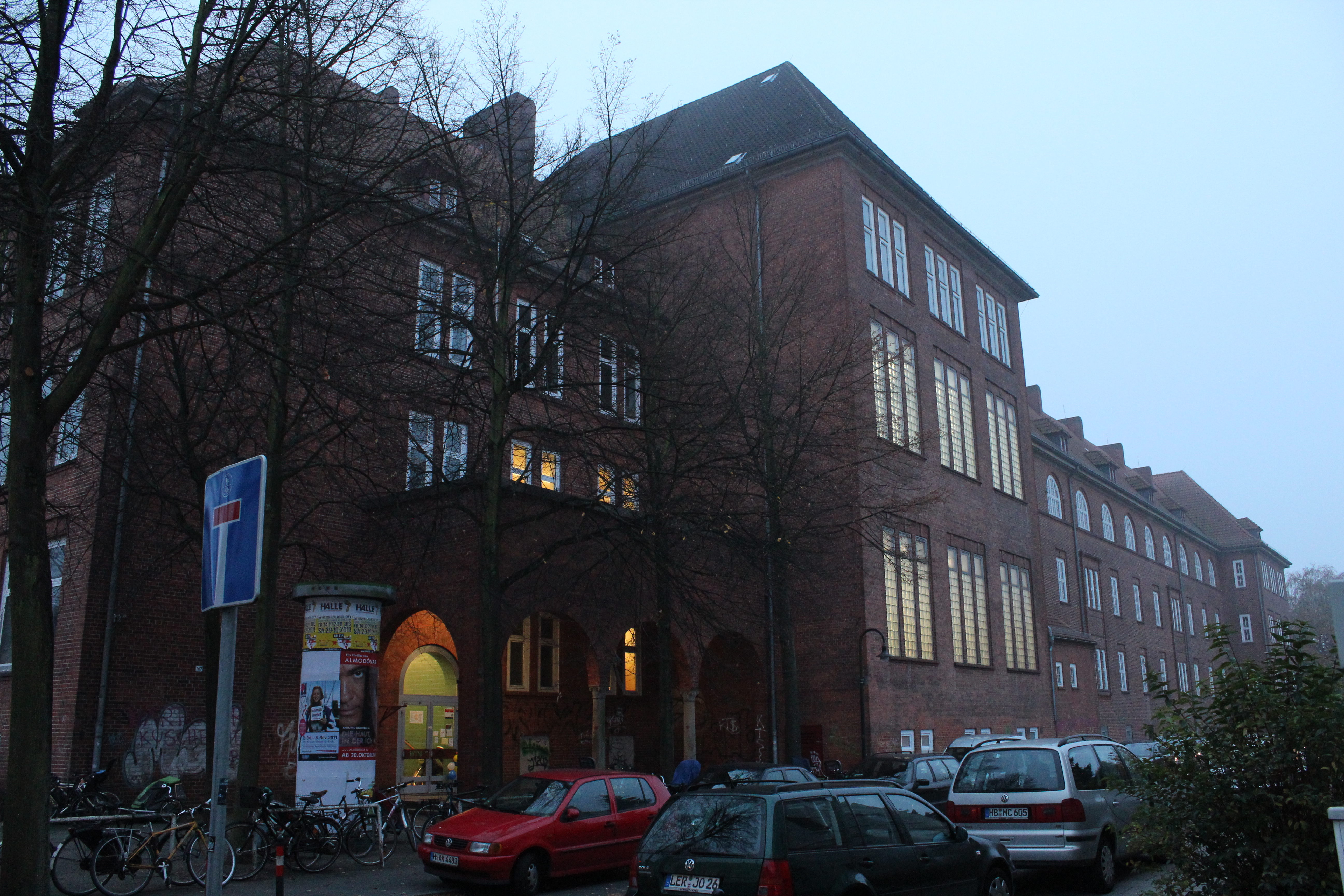 Schule an der Kornstraße in Bremen, Kornstraße 167. Das abgebildete Objekt ist ein geschütztes Kulturdenkmal in der Freien Hansestadt Bremen, mit der Nr. 1834 beim Landesamt für Denkmalpflege registriert.